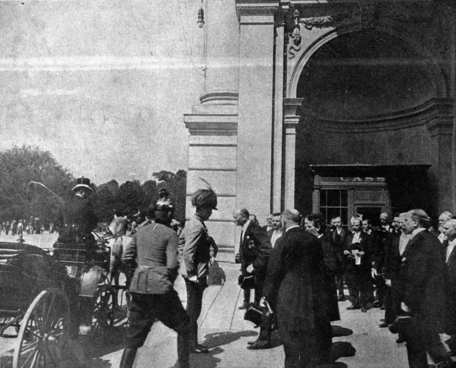 Eröffnung der Wiener Hygieneausstellung 1906 im Beisein von Erzherzog Franz Salvator von Österreich-Toskana